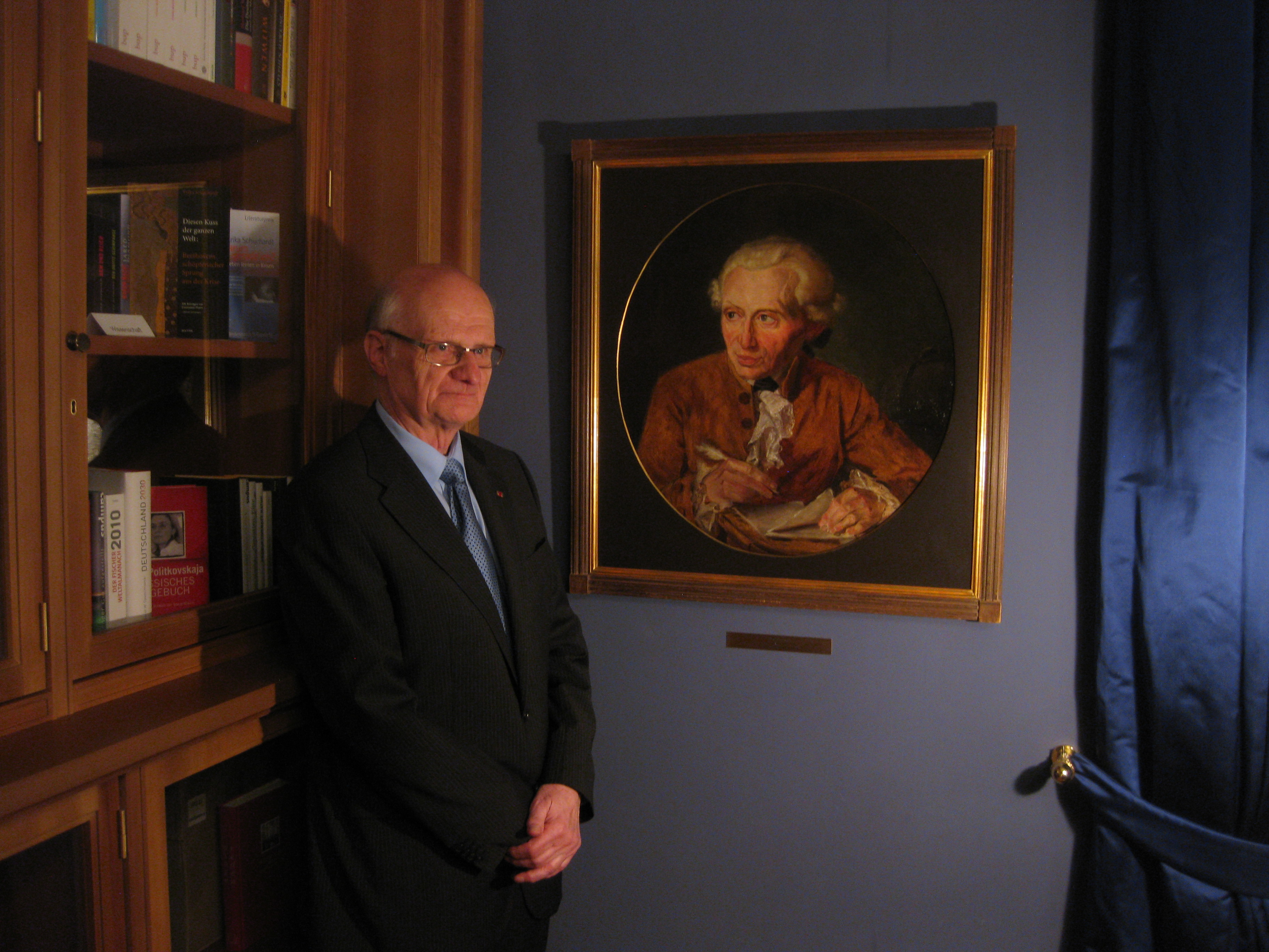 Lorenz Grimoni vor dem „Immanuel Kant, Porträt, gemalt von Gottlieb Doebler, Öl auf Leinwand, 1791“, ausgeliehen an die Parlamentarische Gesellschaft in Berlin im Rahmen der Kant-Dekade 2014–2024